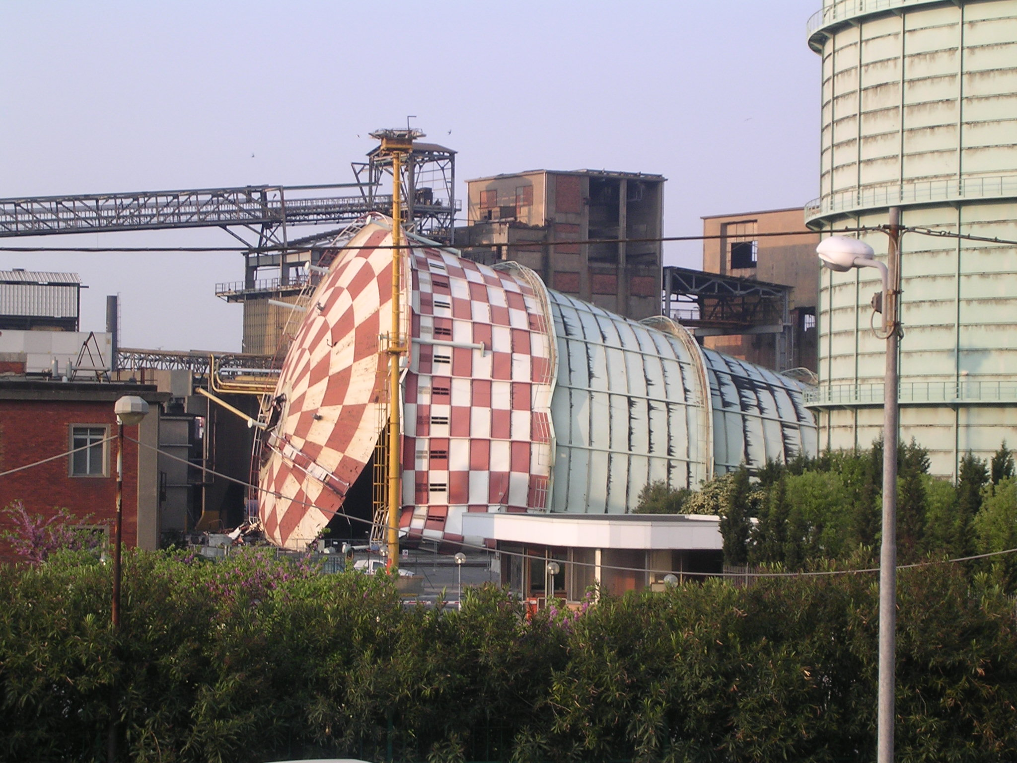 L'abbattimento del gasometro piccolo avvenuta il 21 aprile 2007